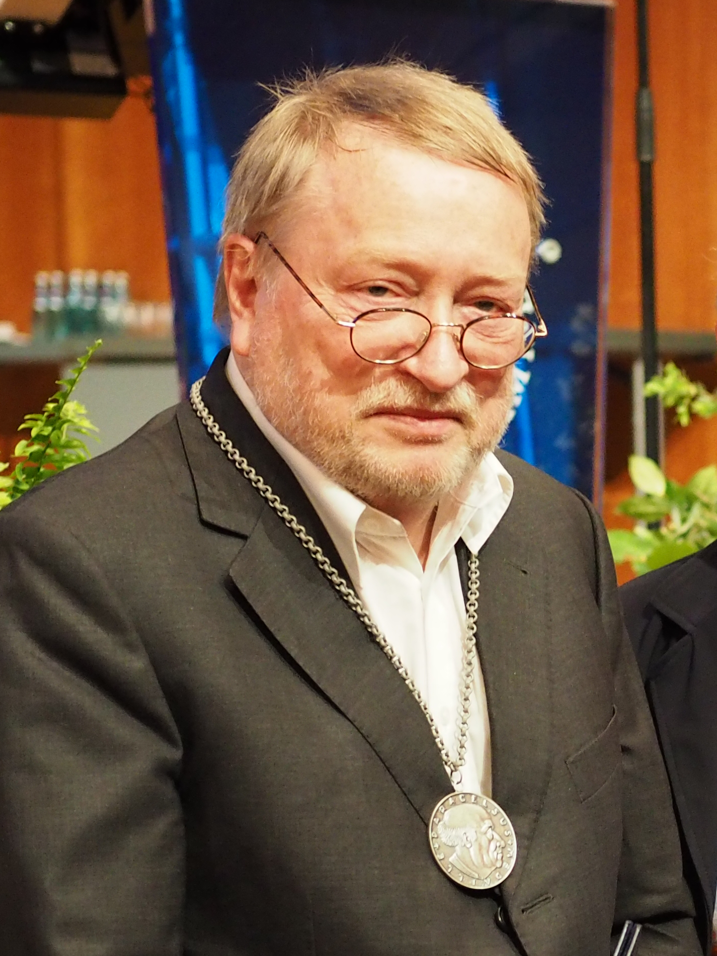 Klaus-Dieter Wurche mit Paracelsusmedaille beim DÄT 2017 in Freiburg